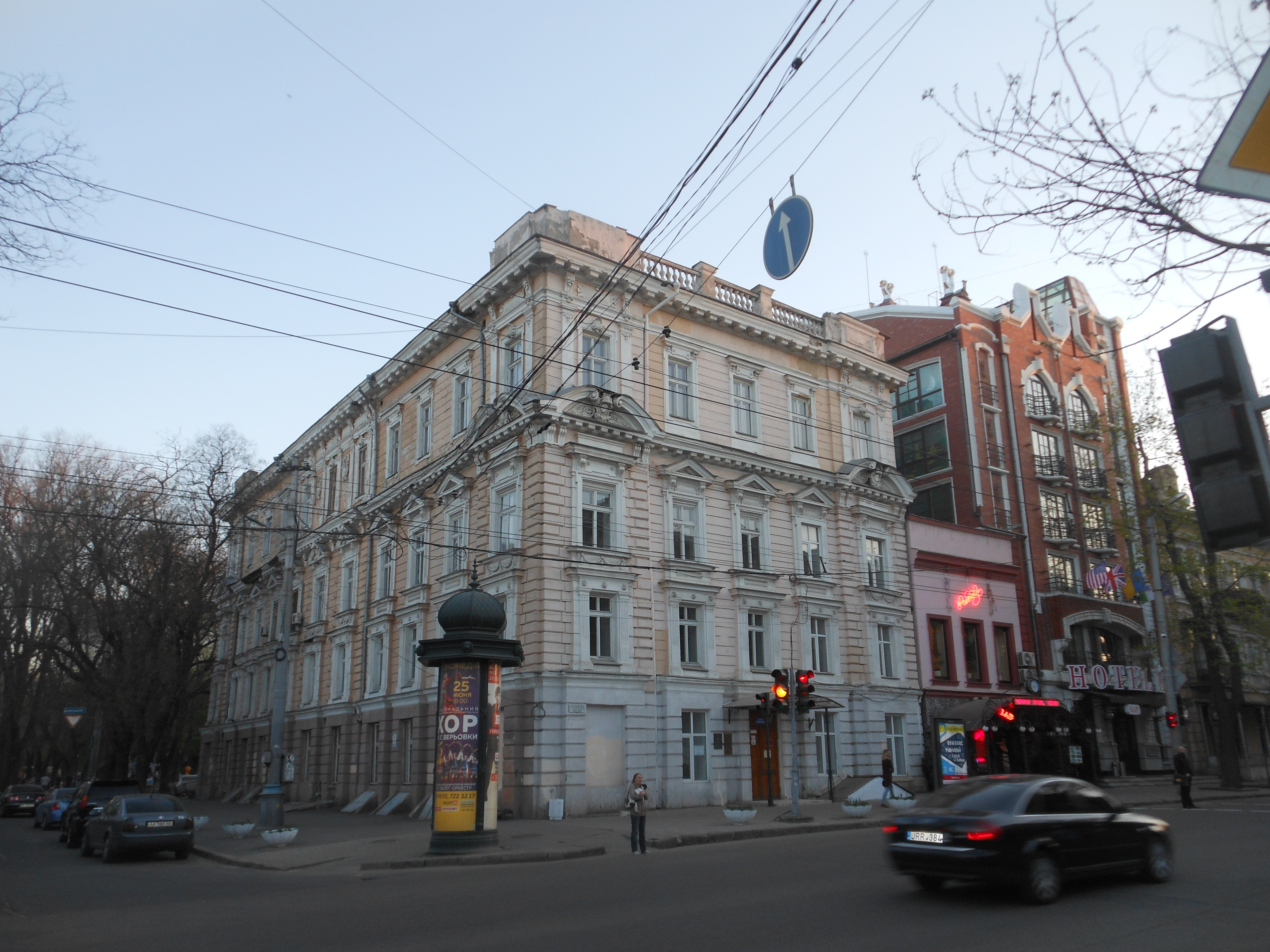 Будинок з крамницею Пташникових, Одеса, вул. Успенська, 91 (ріг вул. Успенської, 91 та просп. Олександрівського)